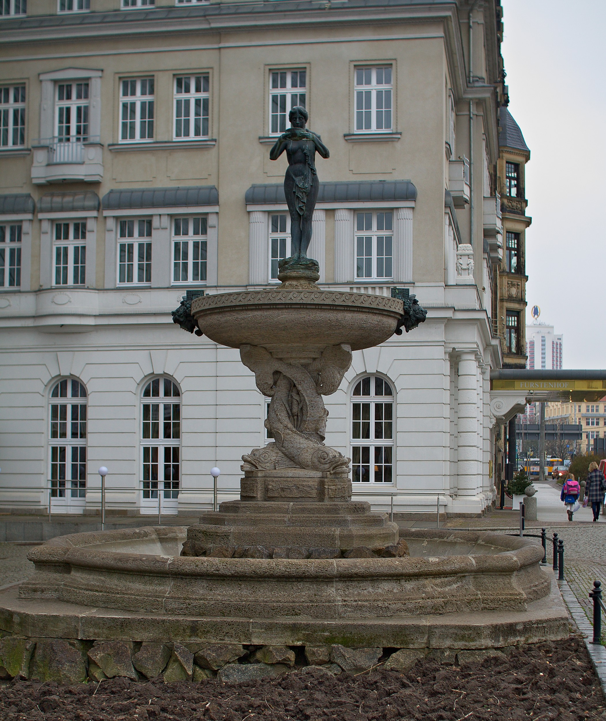 Villersbrunnen am Tröndlinring in Leipzig; errichtet 1903; Skulptur 2003 erneuert